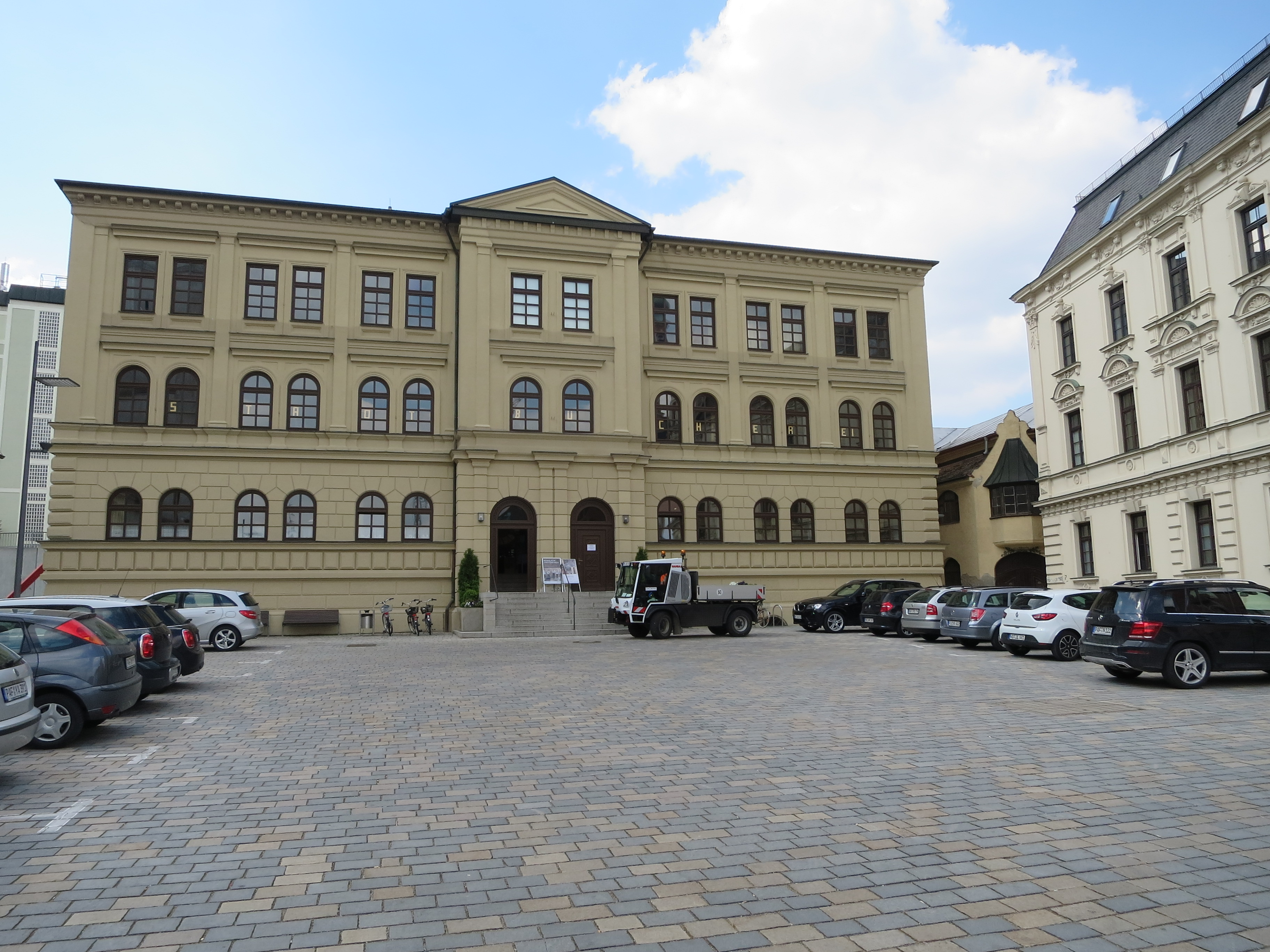 Ehemalige Schule, heute Haus der Begegnung mit Stadtbücherei und Galerie